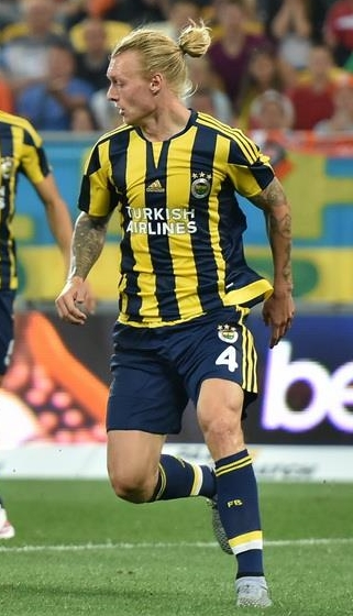 Simon Kjær, 5 Ağustos 2015 tarihindeki Şahtar Donetsk karşılaşmasında, Fenerbahçe formasıyla.